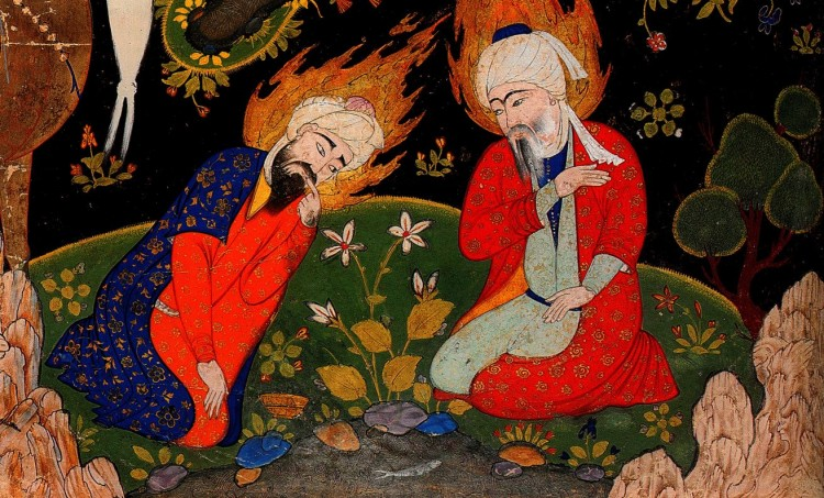 Elias und Chidr an der Lebensquelle. Safawidische Miniatur aus einer für Sultan Ahmed I. zusammengestellten Fālnāma, in der osmanisch-türkische Texte und Bilder verschiedener Maler aus verschiedenen Zeiten einander gegenübergestellt wurden.